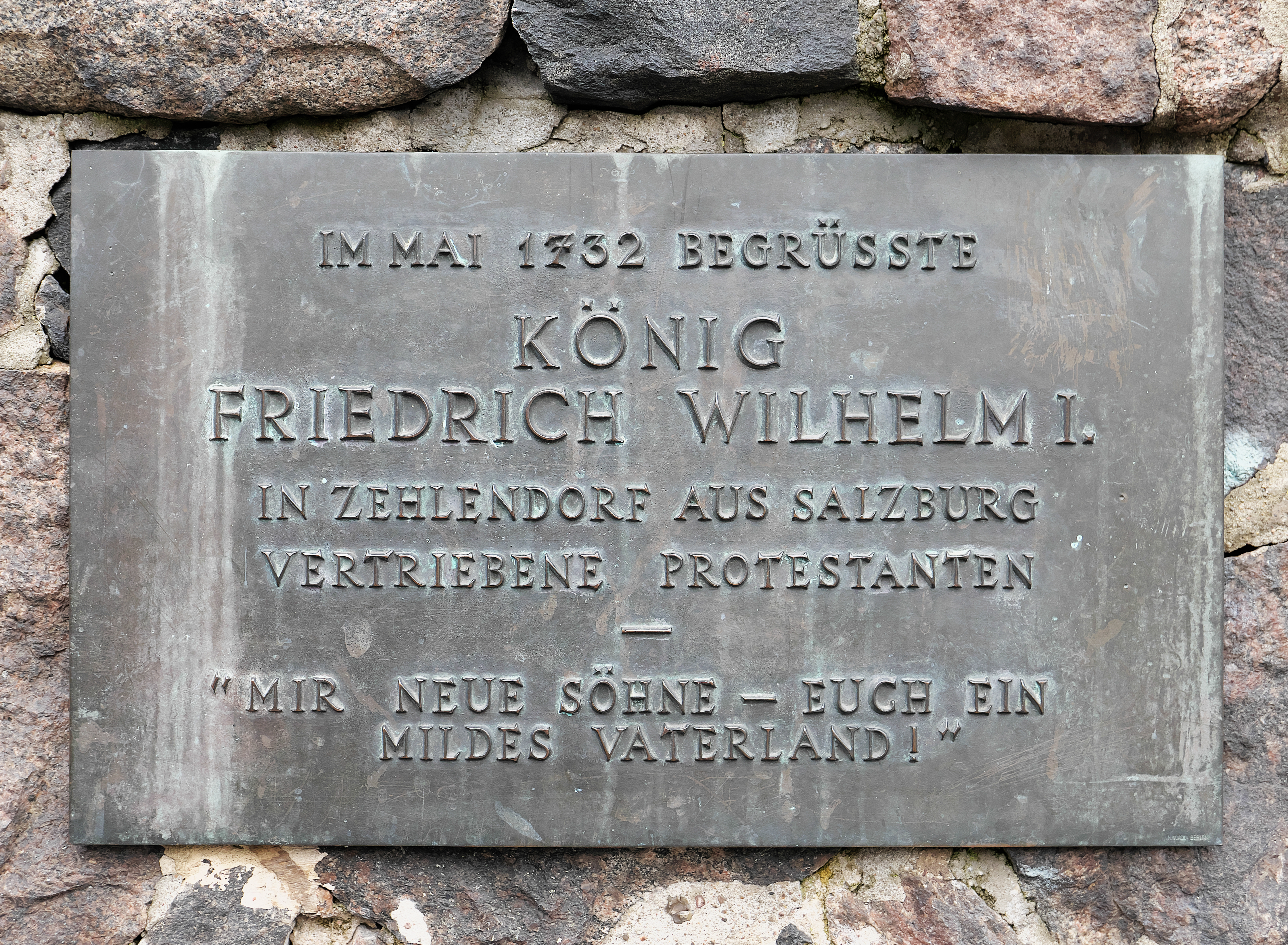 Gedenktafel für die Salzburger Exulanten an der Mauer vor der Dorfkirche in Zehlendorf. Friedrich Wilhelm I. soll die Exulanten im Mai 1732 vor der Zehlendorfer Dorfkirche mit den Worten "Mir neue Söhne – euch ein mildes Vaterland!" begrüßt haben.